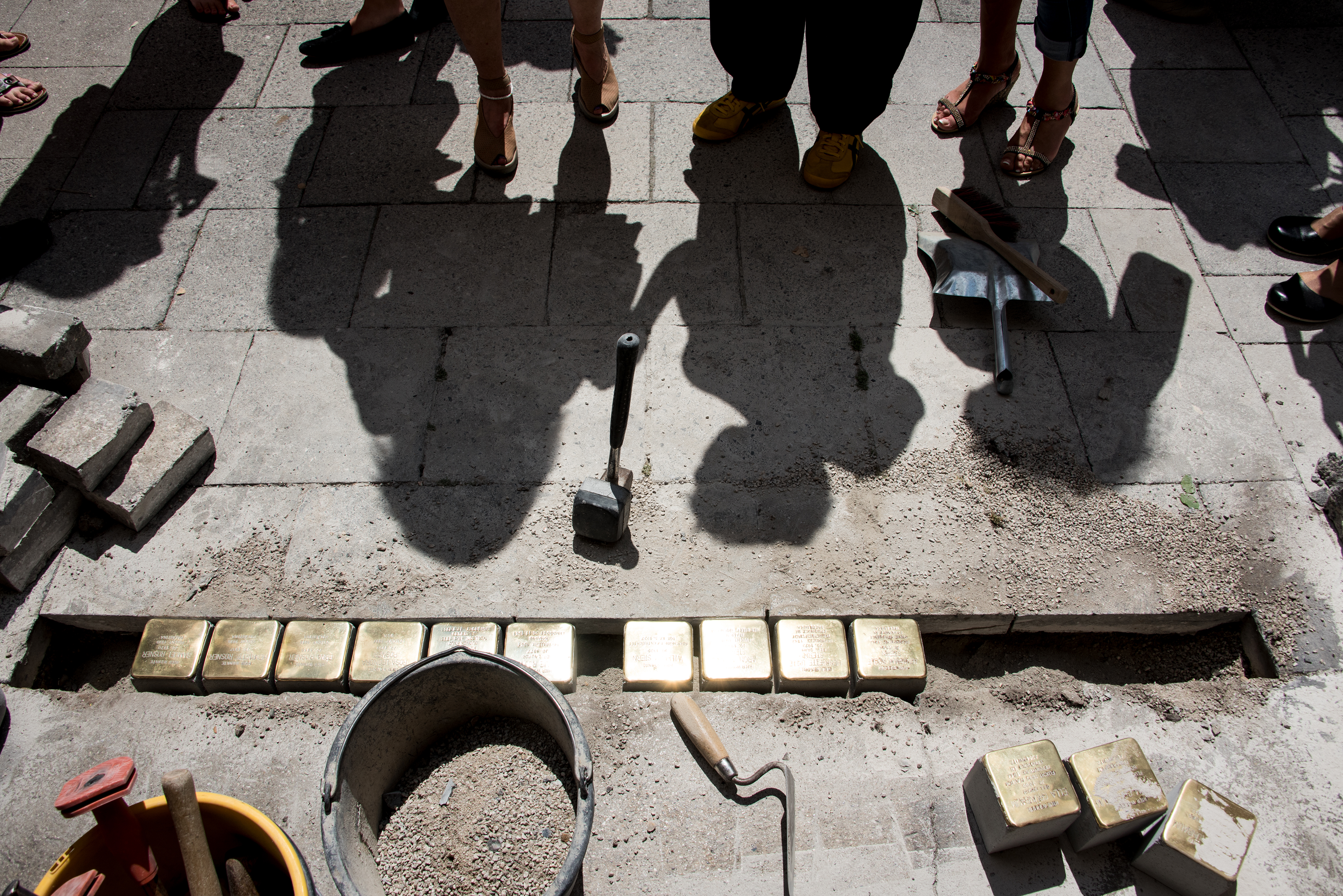 Stolpersteinverlegung in München am 27. Juni 2017